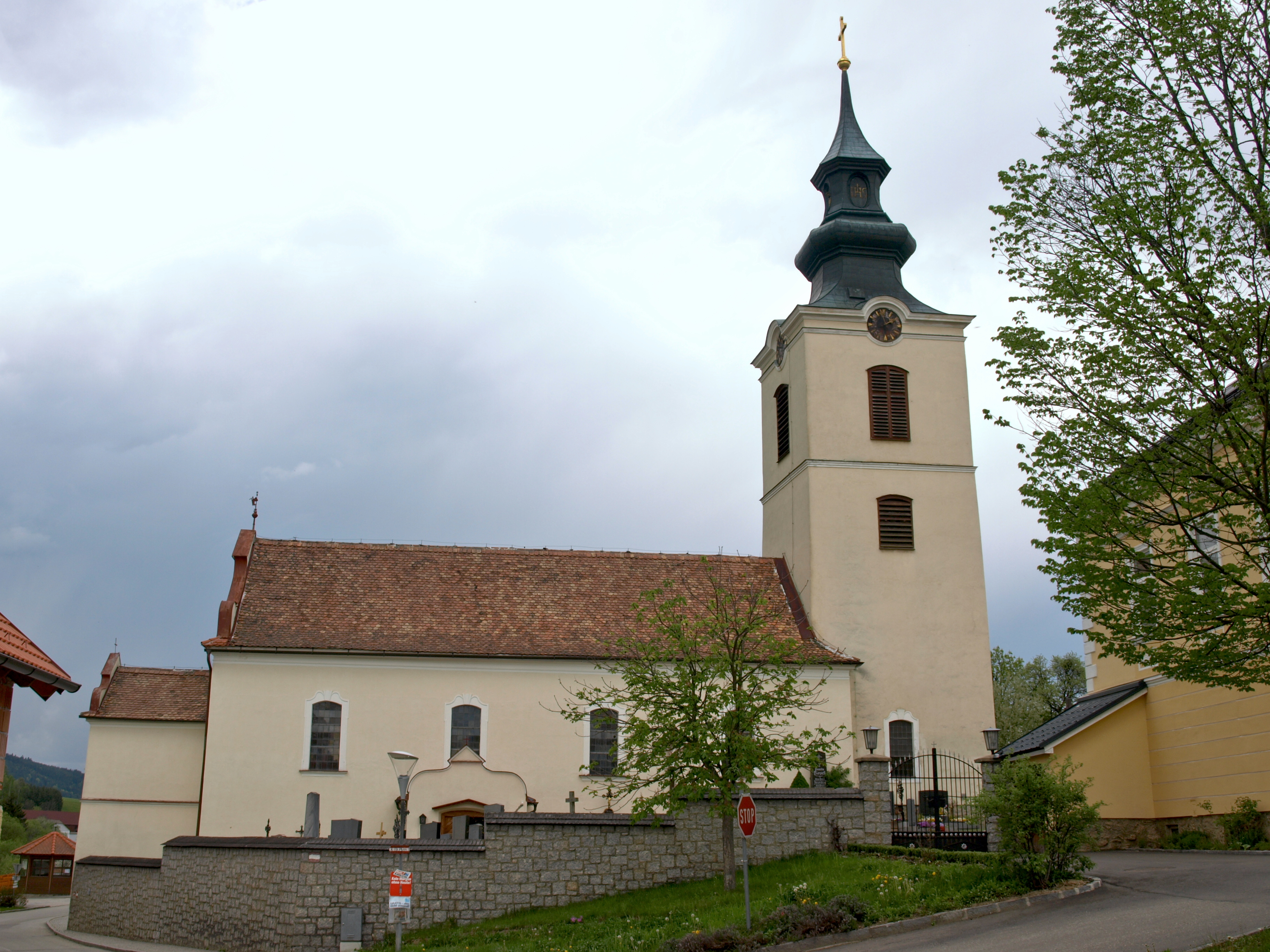 Kath. Pfarrkirche hl. Martin